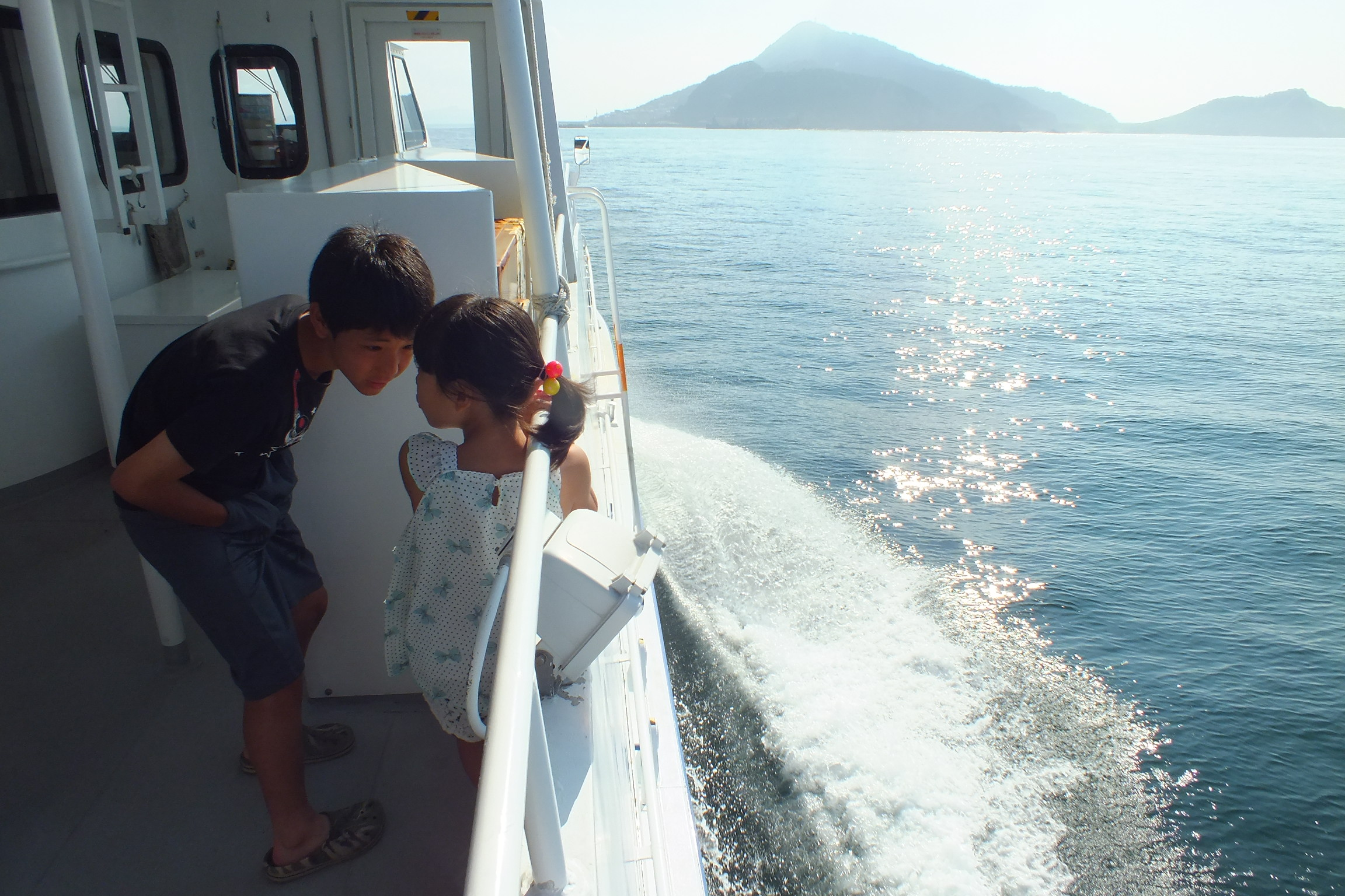 kamishima 神島（三重県） 鳥羽市営定期船